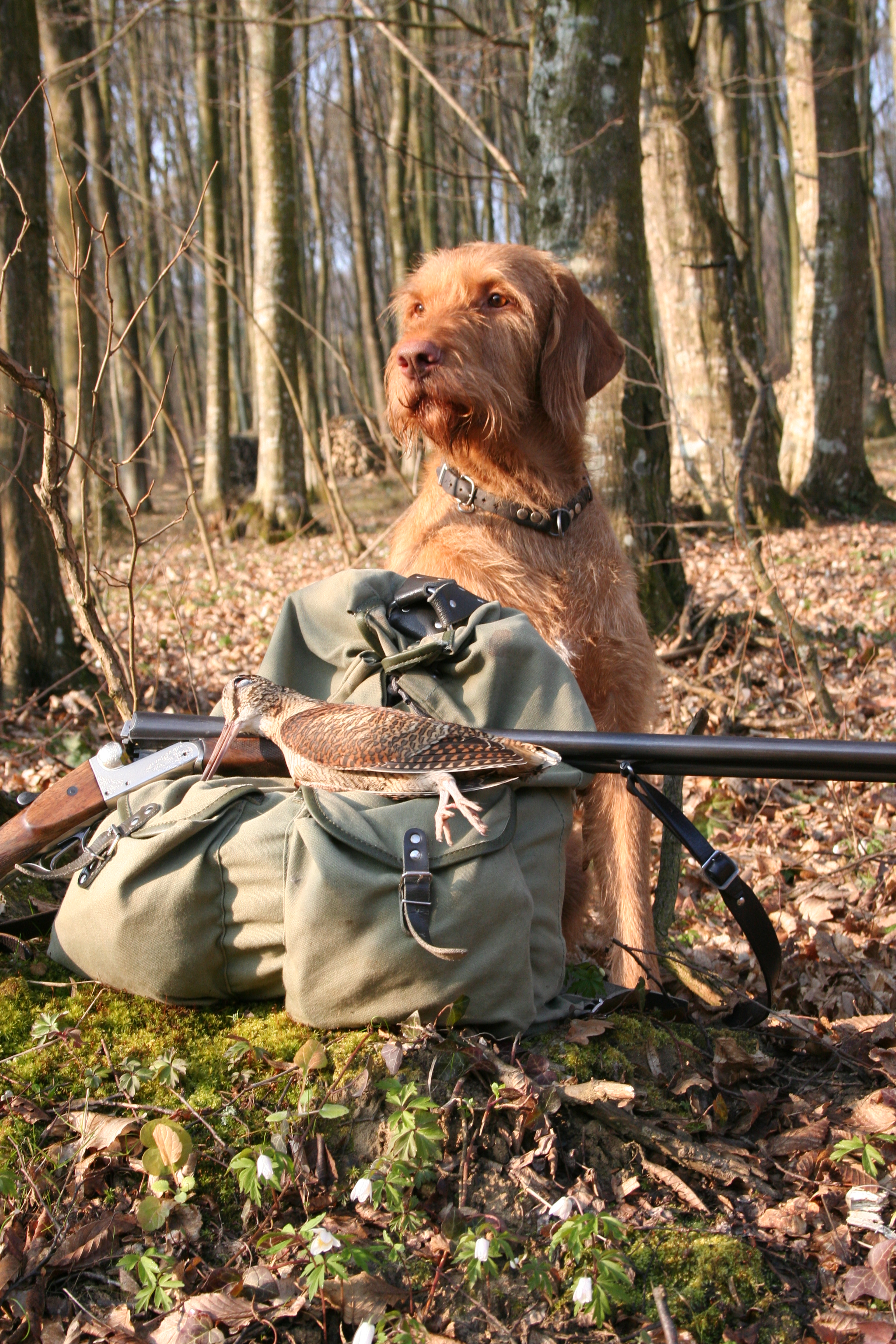 Magyar Vizsla Drahthaar